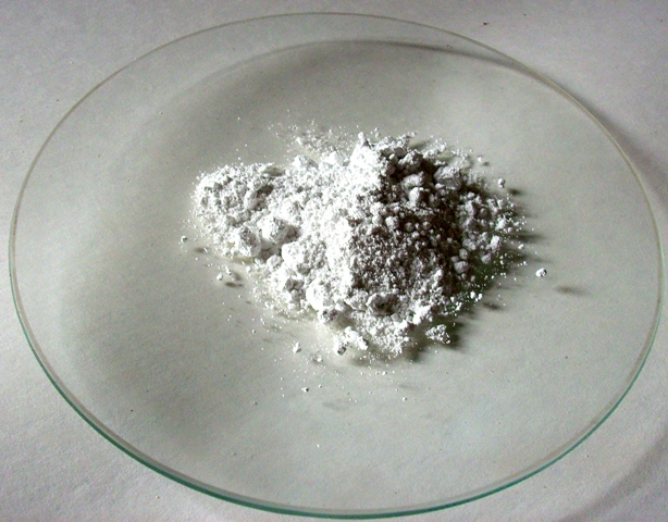 Titanium dioxide TiO2